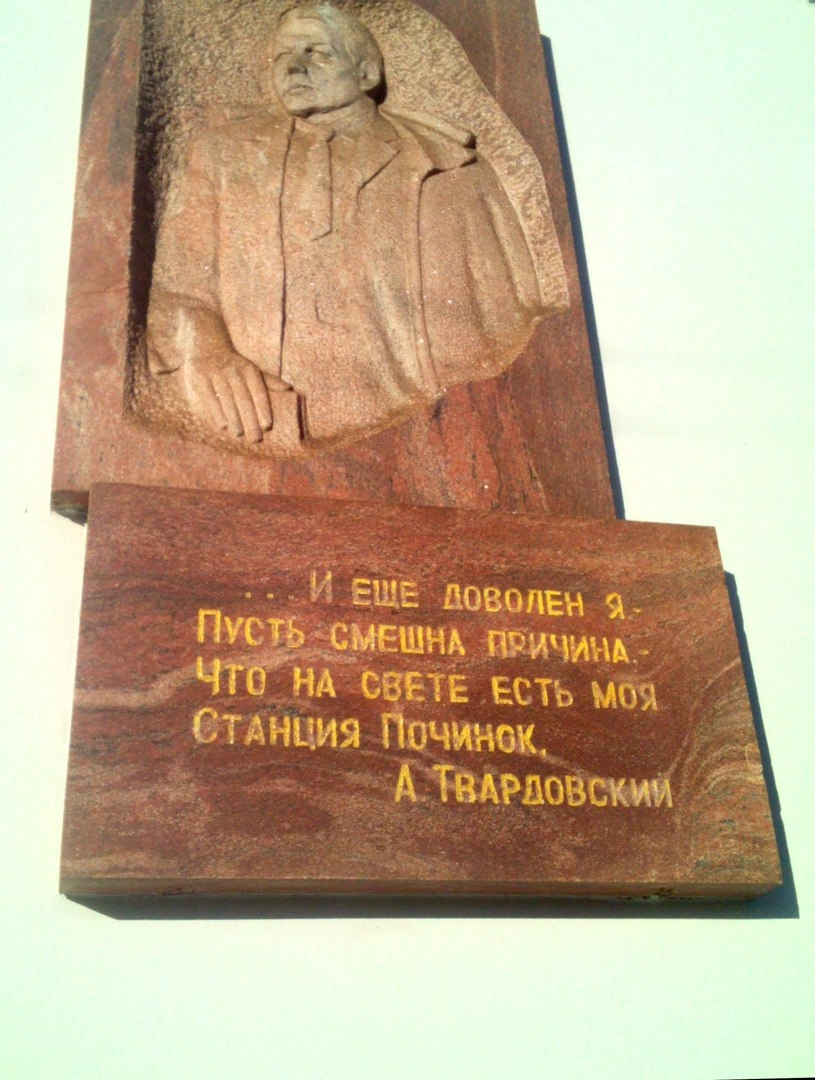 "...А ещё доволен я Пусть смешна причина, Что на свете есть моя Станция Починок" А. Твардовский